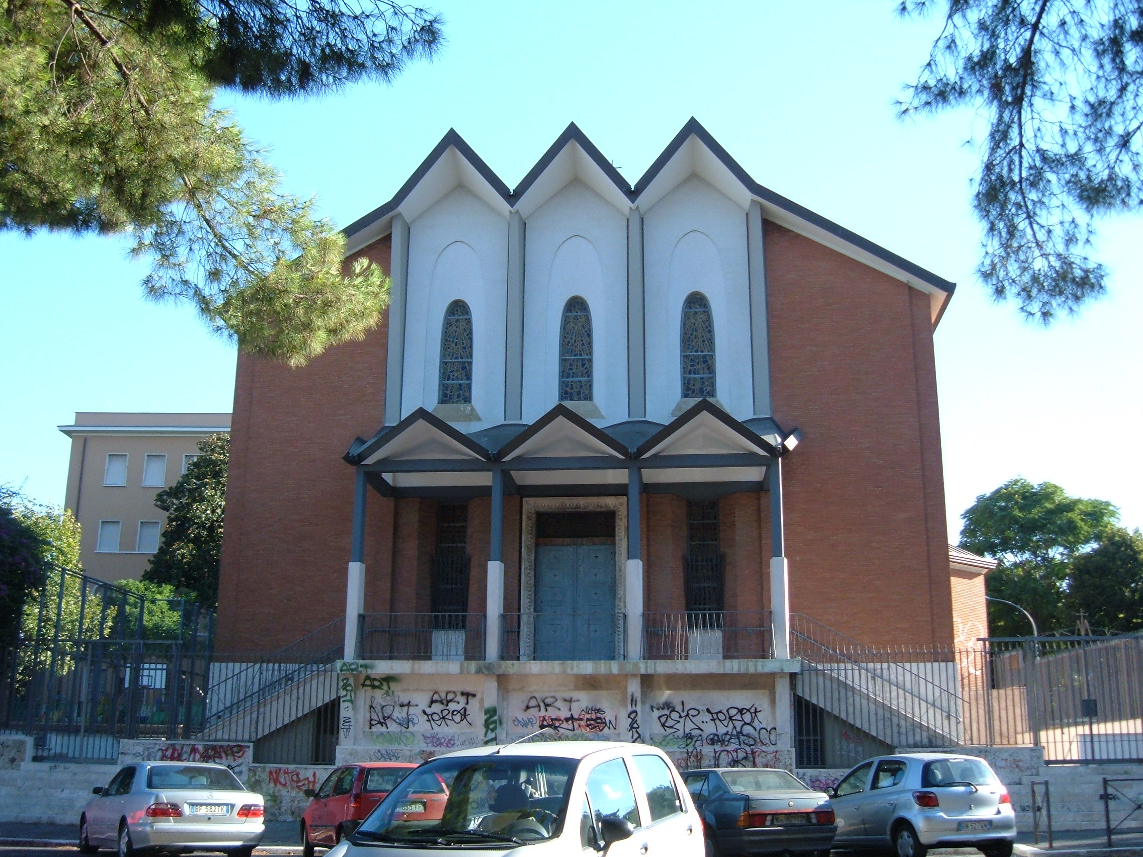 Chiesa della Sacra Famiglia, a Roma, nel quartiere Ostiense, in via David Salinieri.